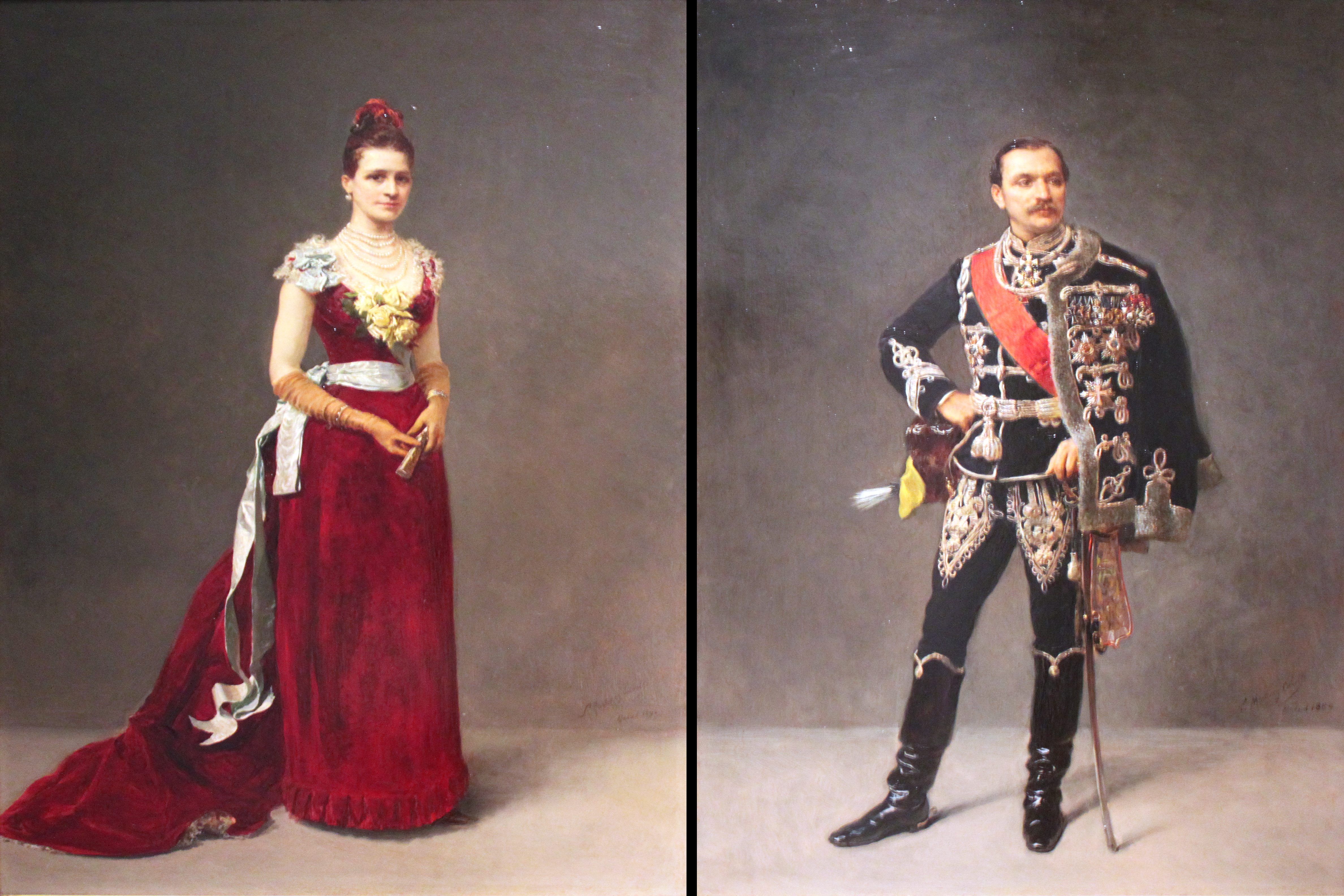 Ferdinand Eduard Freiherr von Stumm (1843-1925) und seine Gattin Pauline (1858-1950)Ferdinand Eduard Freiherr von Stumm (1843-1925) and his wife Pauline (1858-1950)label QS:Lde,"Ferdinand Eduard Freiherr von Stumm (1843-1925) und seine Gattin Pauline (1858-1950)"label QS:Len,"Ferdinand Eduard Freiherr von Stumm (1843-1925) and his wife Pauline (1858-1950)"label QS:Lfr,"Ferdinand Eduard Freiherr von Stumm (1843-1925) et son épouse Pauline (1858-1950)"label QS:Lru,"Фердинанд Эдуард барон фон Stumm (1843-1925) и его жены Полины (1858-1950)"